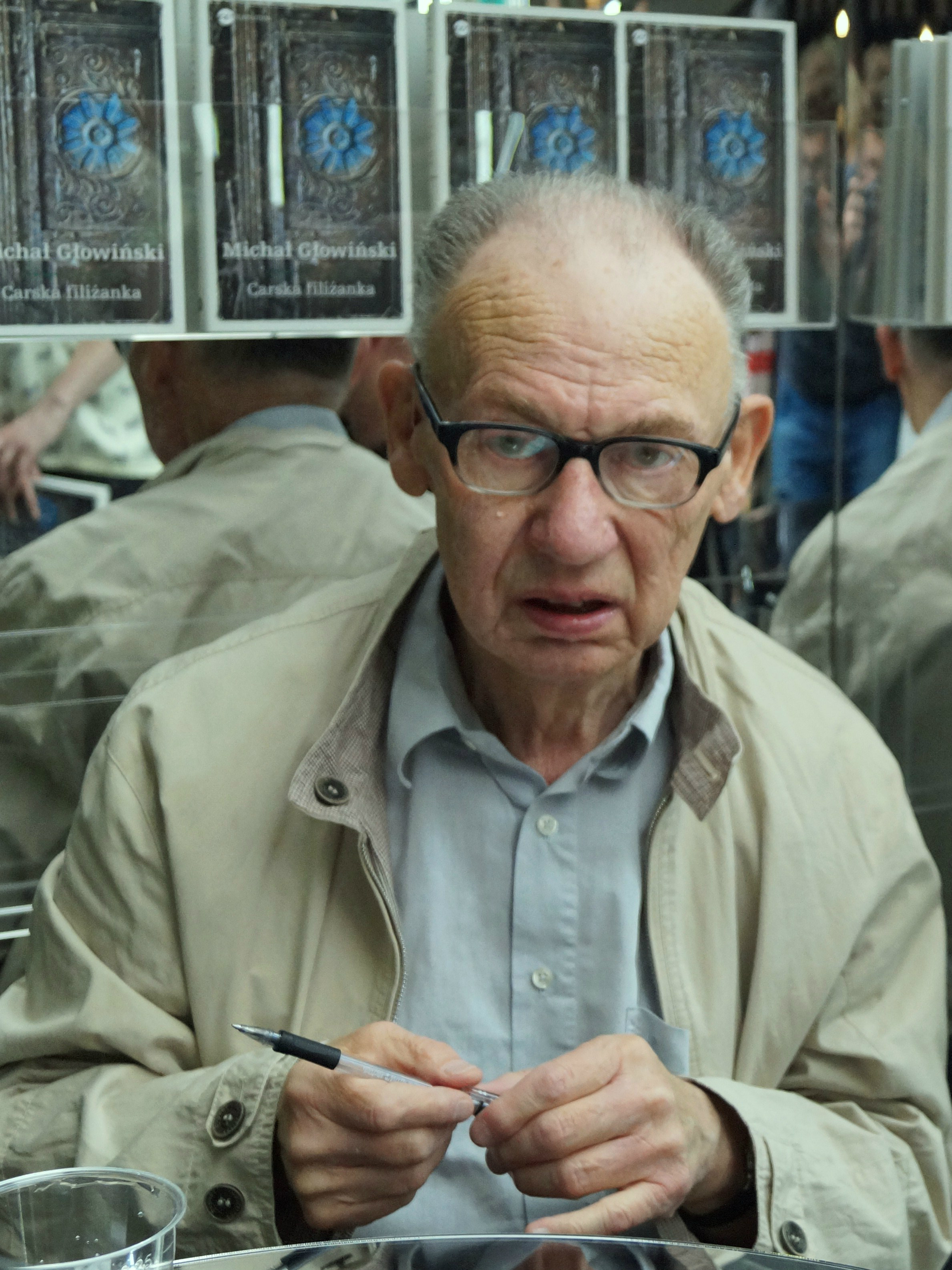 Prof. Michał Głowiński (literaturoznawca) na Warszawskich Targach Książki 2016.